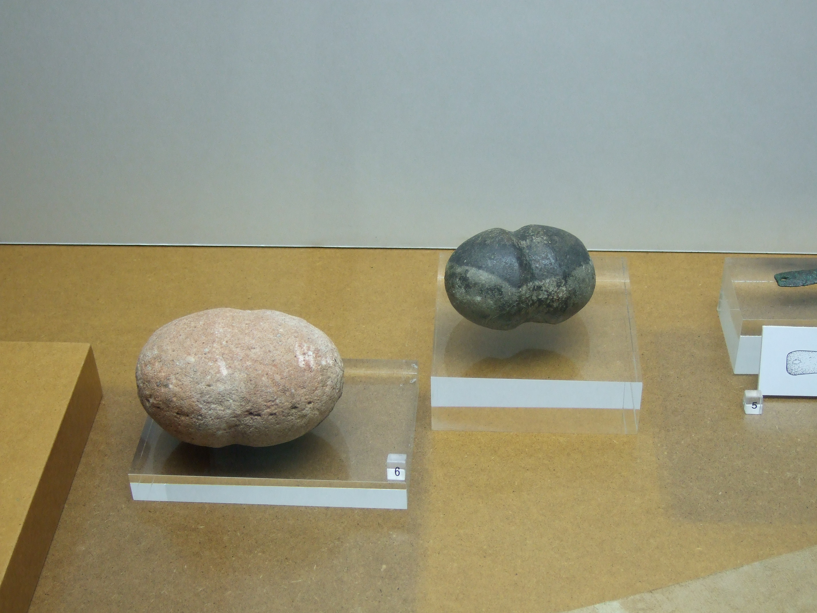 Martillos de piedra, Primera Edad del Hierro. Cabezo de la Cruz, 750 a 500 adC. Museo de Zaragoza